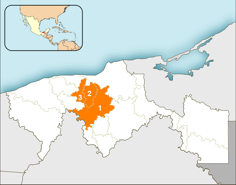 Mapa de la Sub Región de El Centro, en el estado de Tabasco